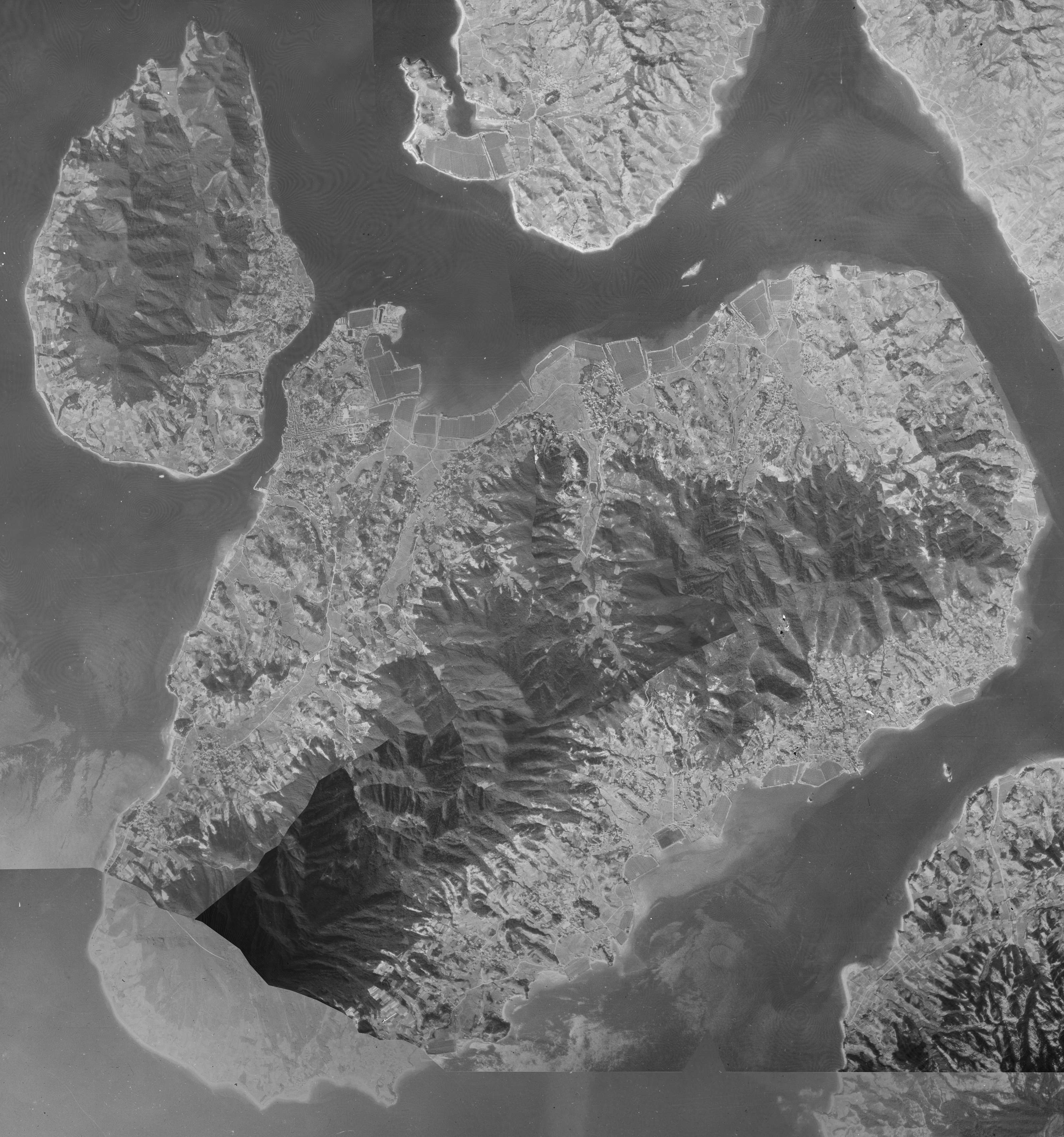 1947年の広島県尾道市の生口島